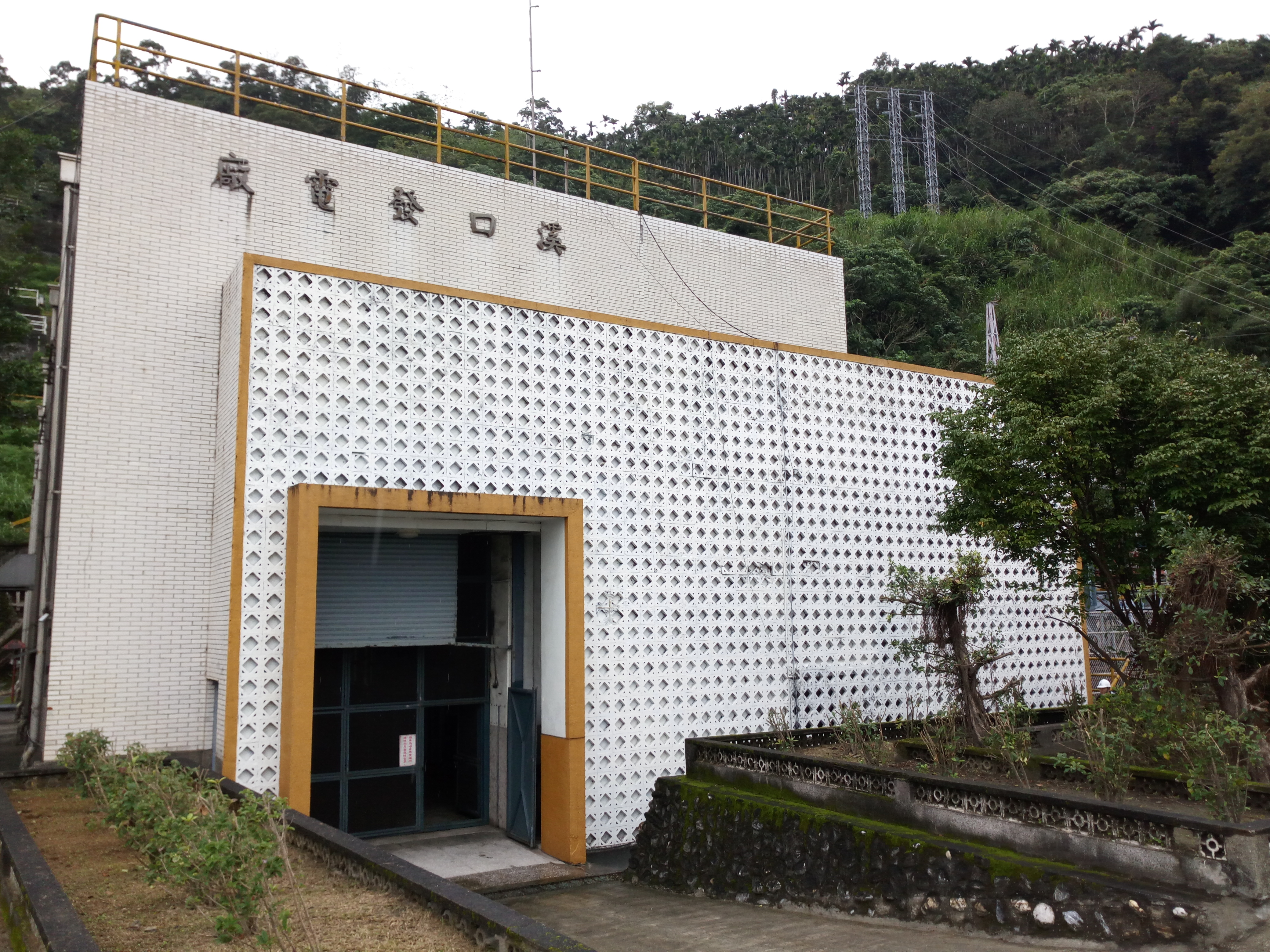 東部發電廠溪口機組廠房正面